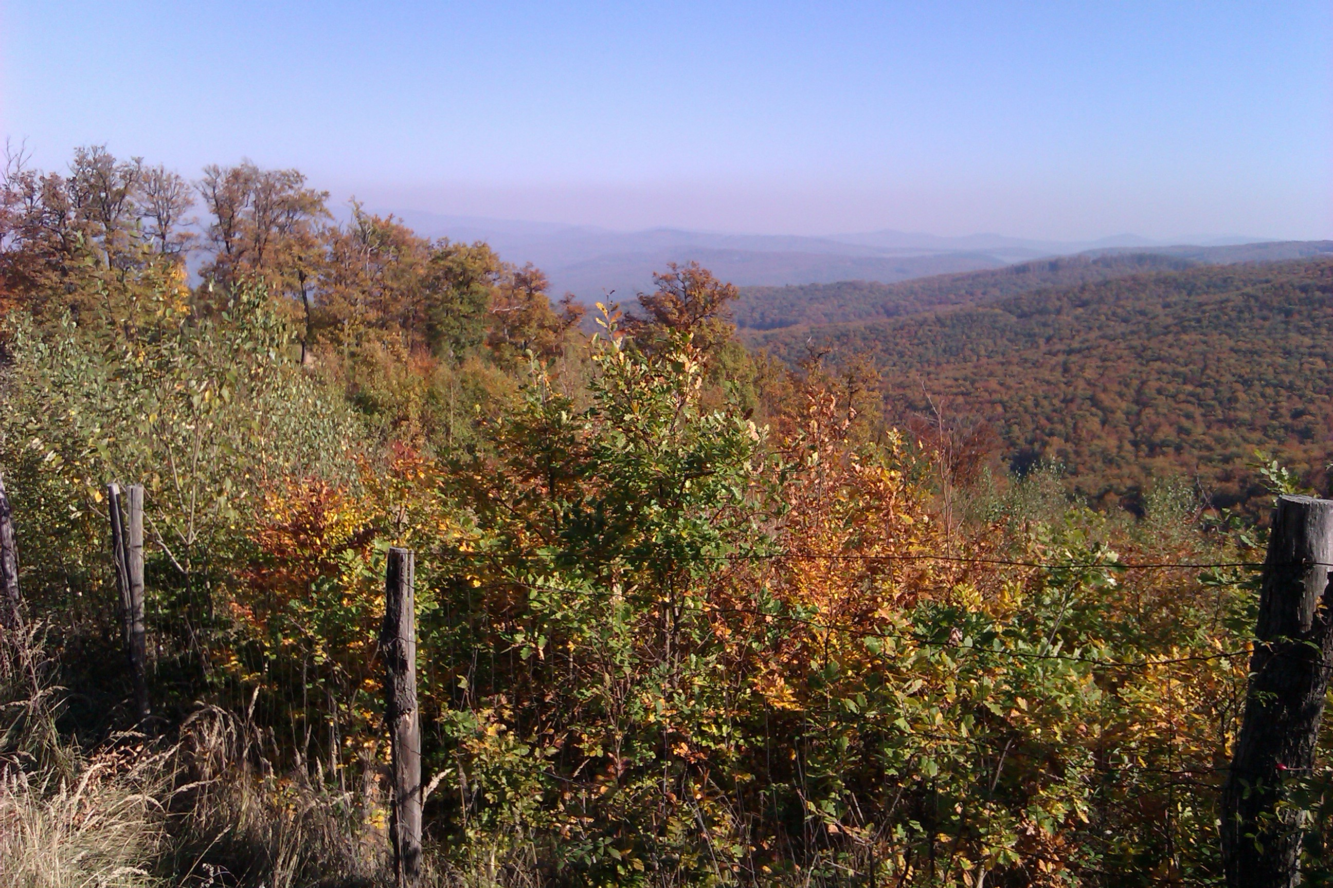 958 44 Klátova Nová Ves, Slovakia